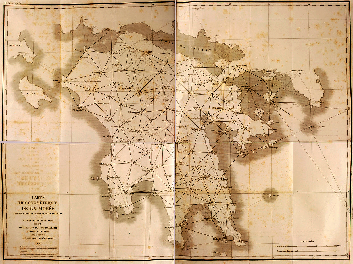 Carte Trigonométrique de la Morée, par MM. Peytier, Puillon Boblaye et Servier (1832)